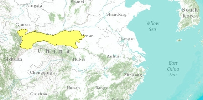 Mappa ecoregione PA0434 - Foreste decidue dei monti Qin Ling